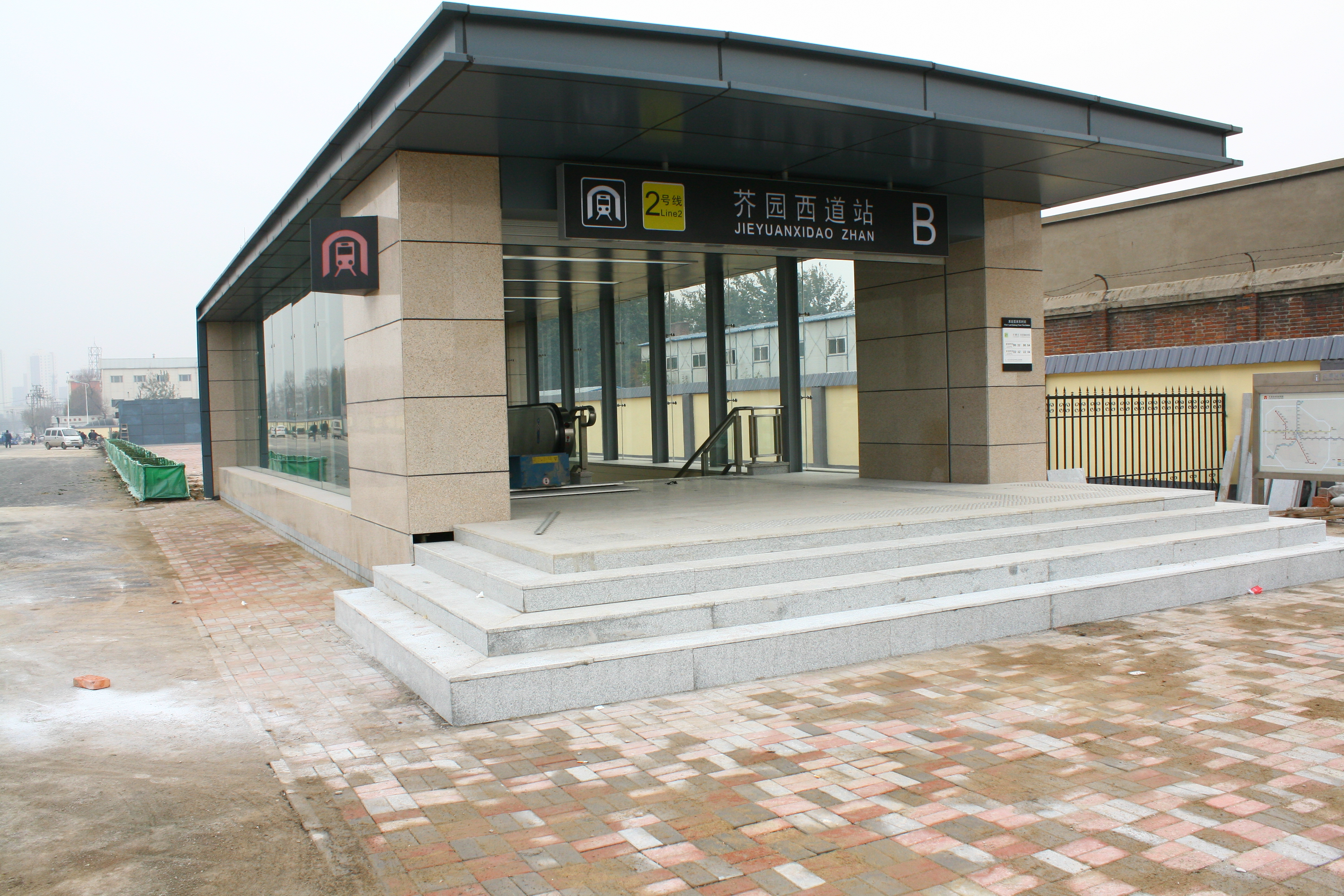 天津地鐵芥園西道站B出口 0001 2012-11-18